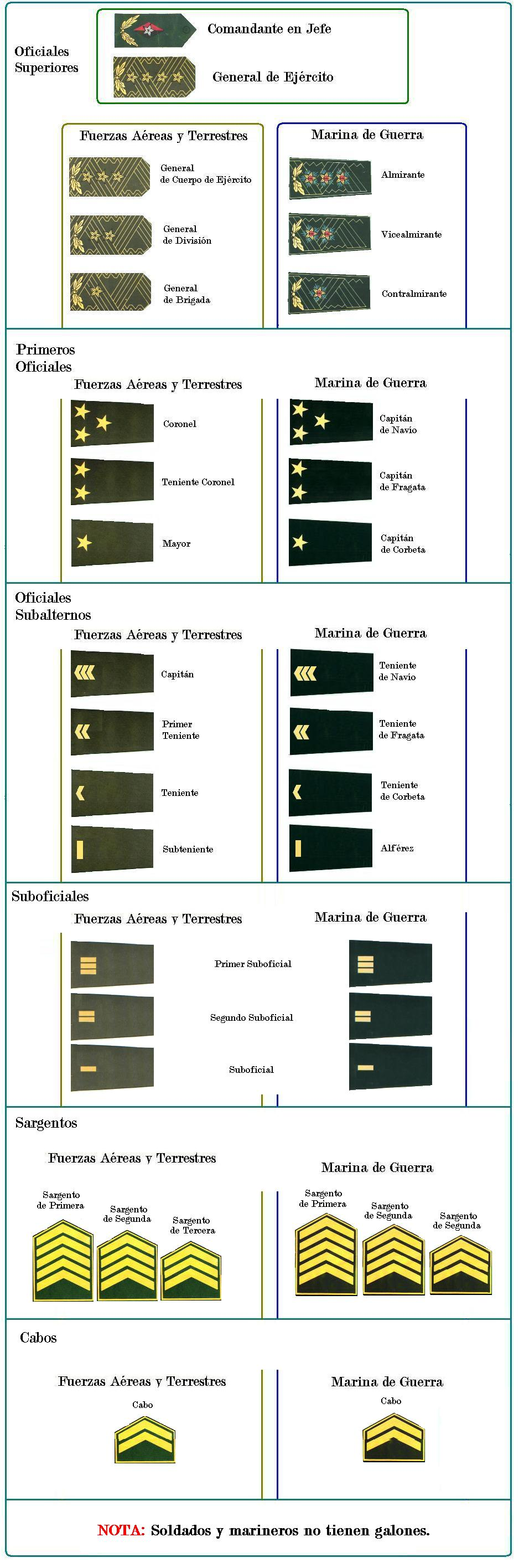 Sistema de Grados Militares de las Fuerzas Armadas Revolucionarias de Cuba. S